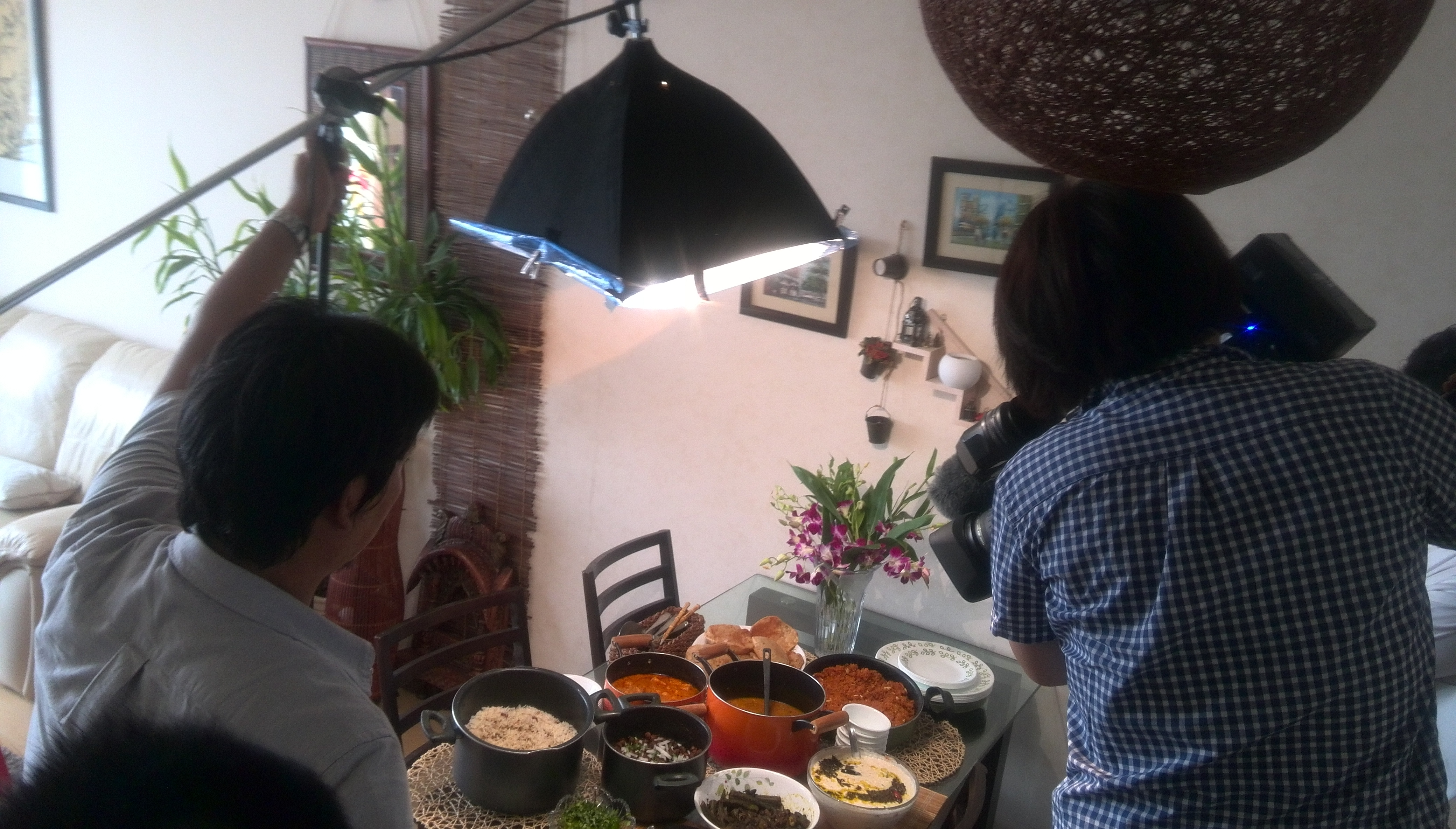 For シブ５時